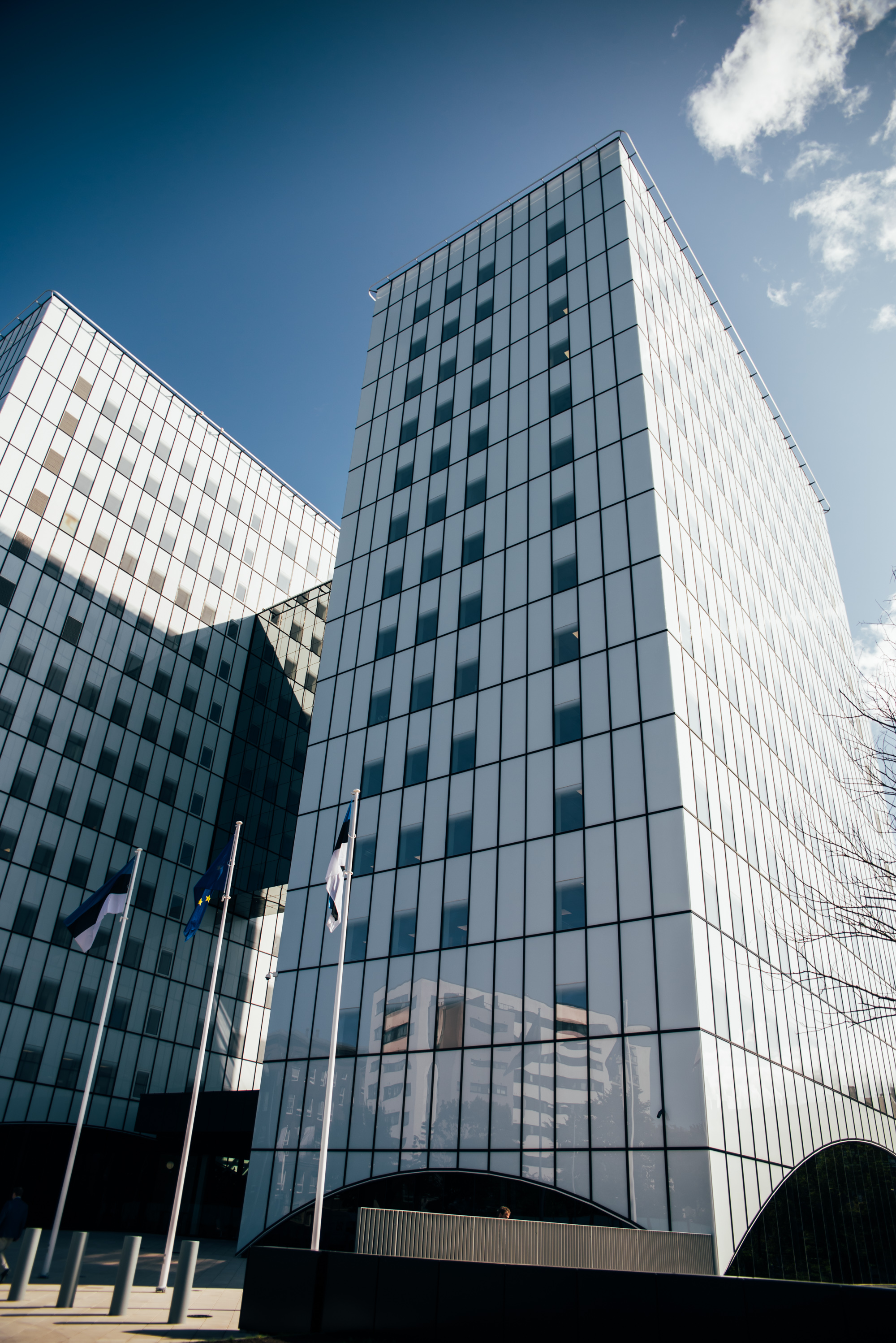 Majandus- ja kommunikatsiooniministeerium asub ühisministeeriumi hoones (Suur-Ameerika tn 1)